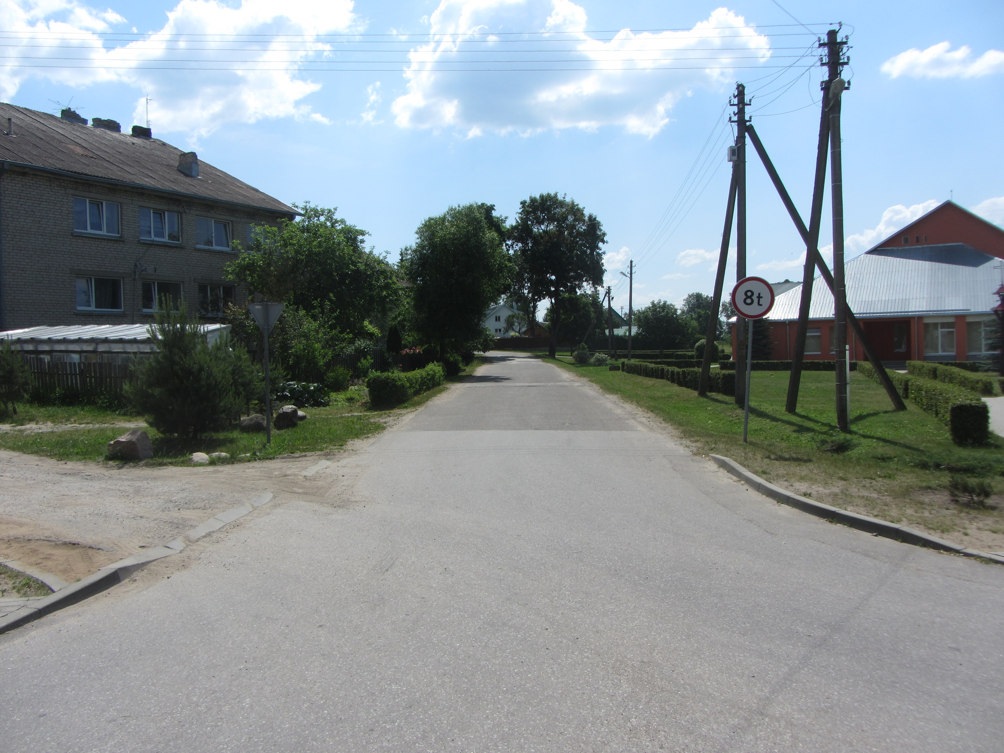 Užusaliai, Lithuania